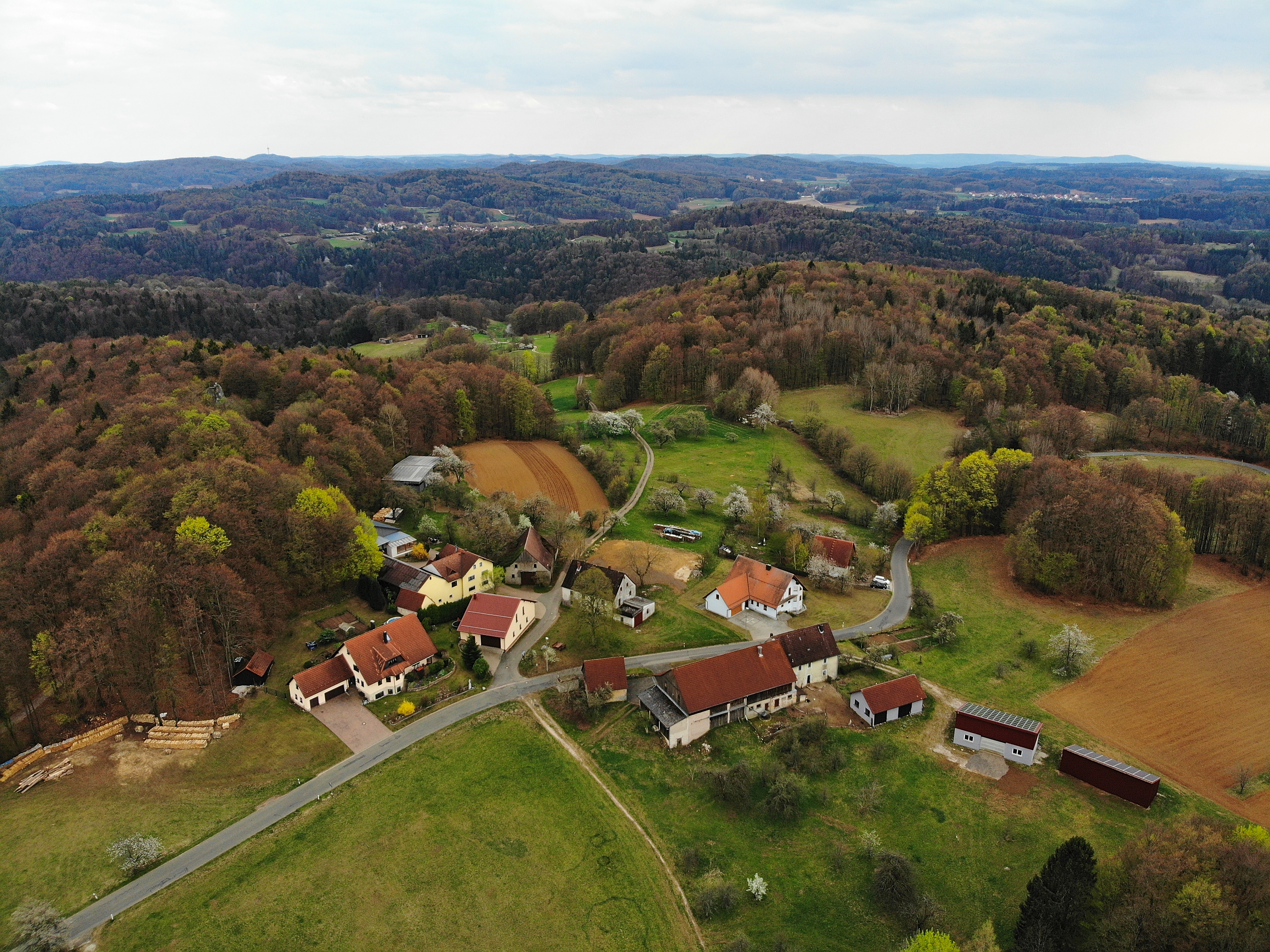 Sorg (Obertrubach) Luftaufnahme (2020)